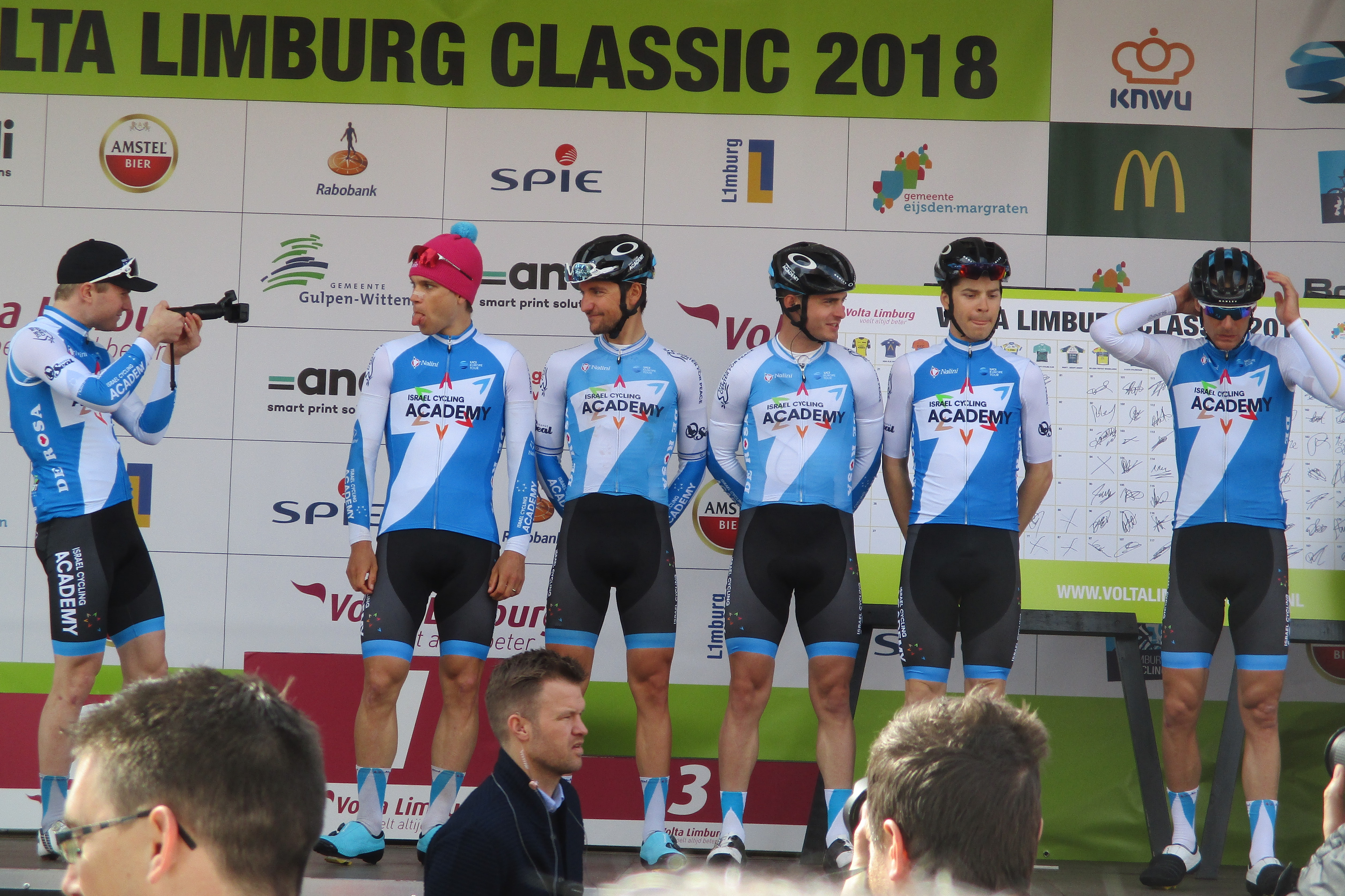 Start van de Volta Limburg Classic 2018 in de Diepstraat in Eijsden